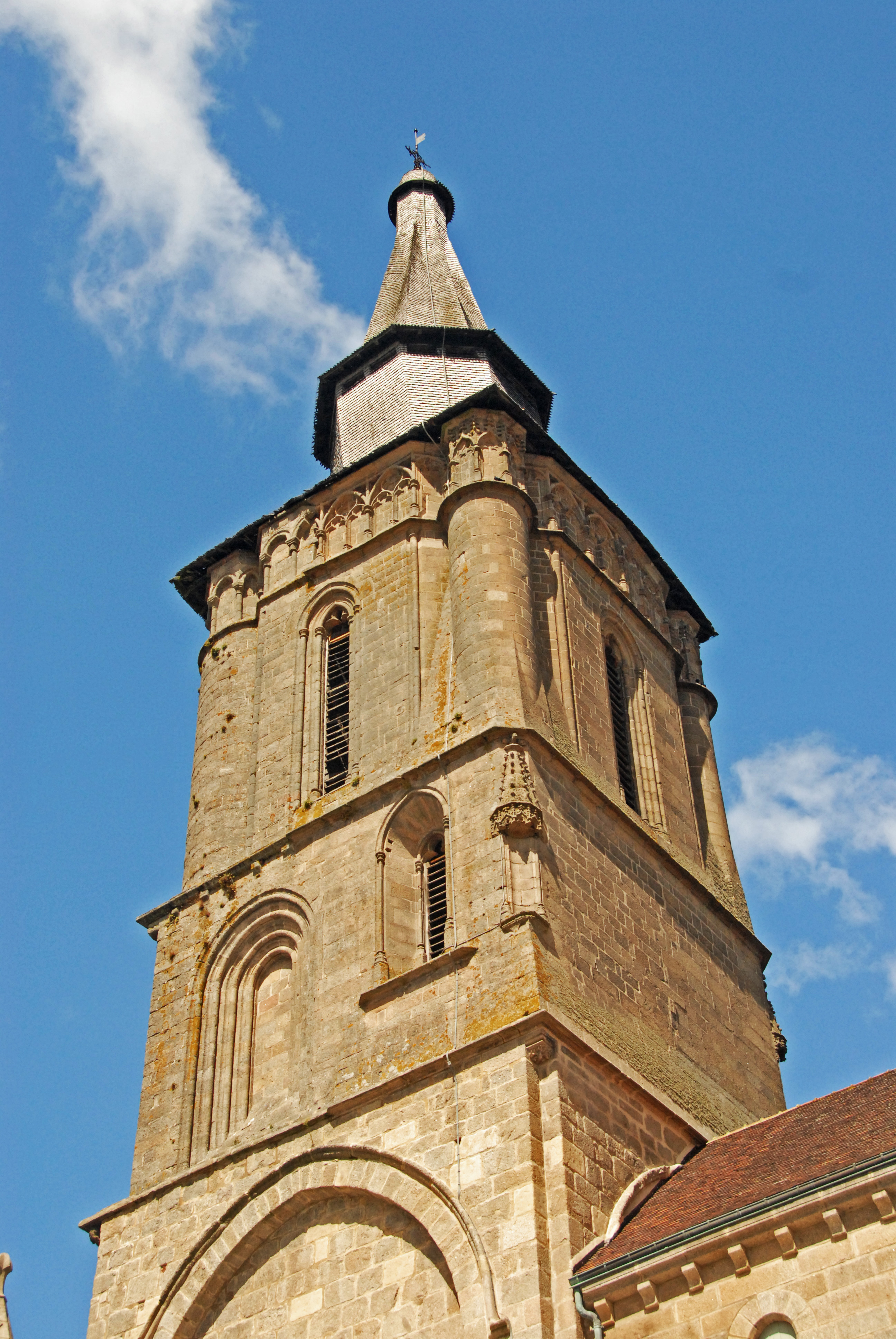 N.-D. de La Souterraine, Turm von SO